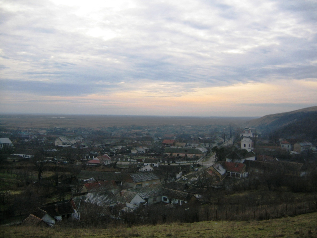 Vedere asupra satului Vărădia (31/12/2005)